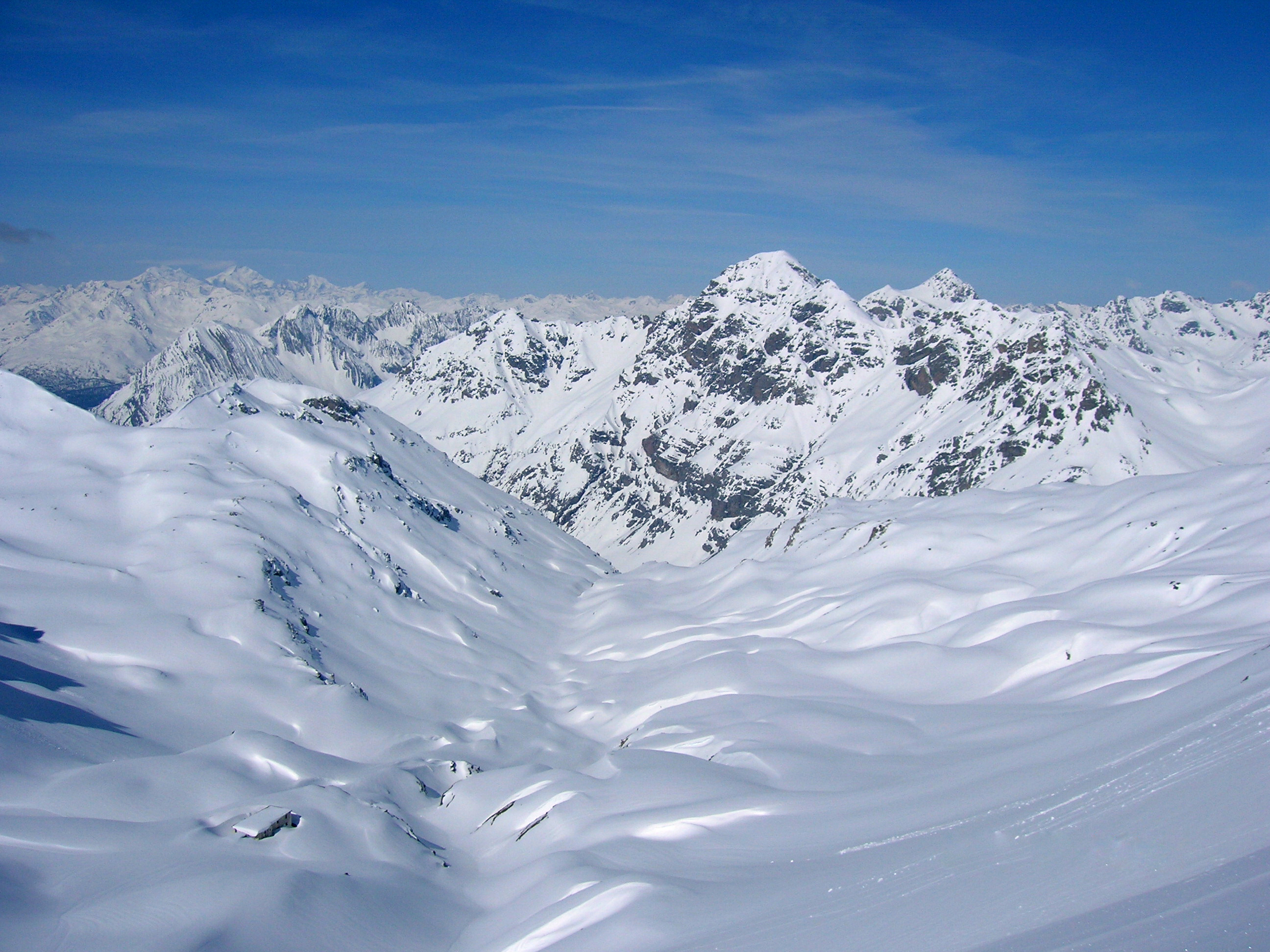 Piz Schumbraida 3124m dalla punta di Rims (da est) (Valtellina-Grigioni)